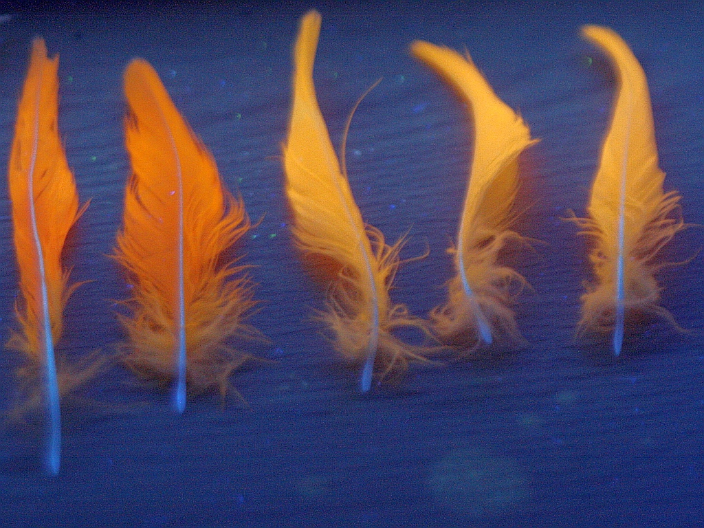 Haubenfedern eines Orangehaubenkakasus unter UV-Licht, die Federn zeigen die bekannte schwefelgelbe Fluoreszenz. Diese beruht auf einem bei Papageienvögeln eigenen UV-Pigment, das in normalem Licht gelblich ist.